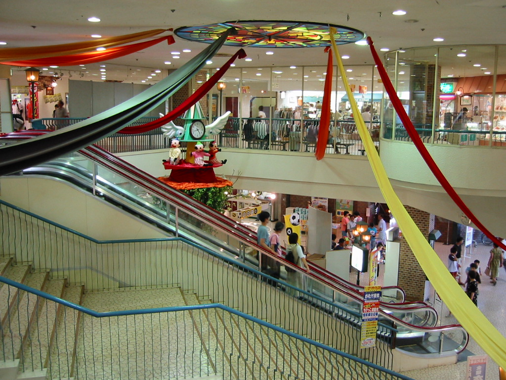 ショッピングタウンピア 南東側正面入口付近の吹き抜けの様子 （福井県福井市二の宮2-8） 2001年8月16日 Mangos撮影